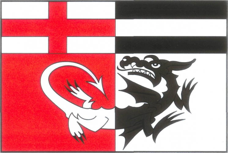 Vlajka, Mladějov na Moravě, okres Svitavy